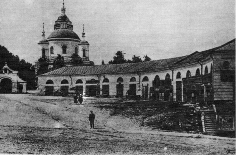 Бол. Серпуховская ул. в Подольске, Подольский храм Св. Троицы и Подольские торговые лабазы, 1819-1832 гг.jpg